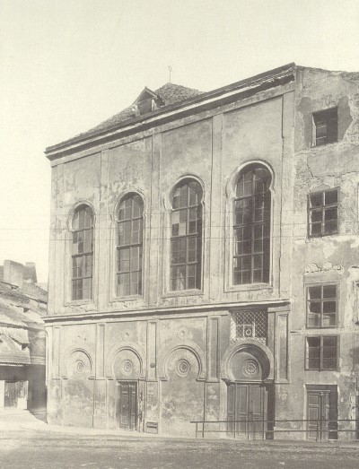 Česky: Velkodvorská synagoga v Praze zbořená v roce 1906 během asanace.